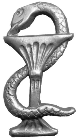 Własna praca Kwz